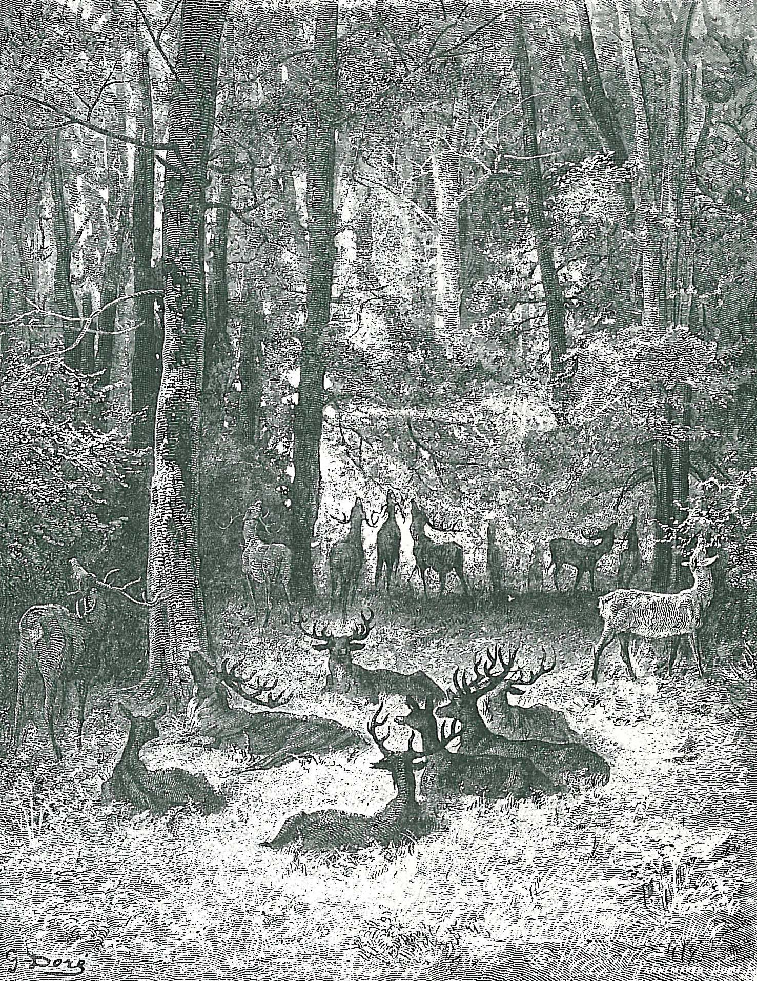 illustration for Jean de La Fontaine's fables by Gustave Doré